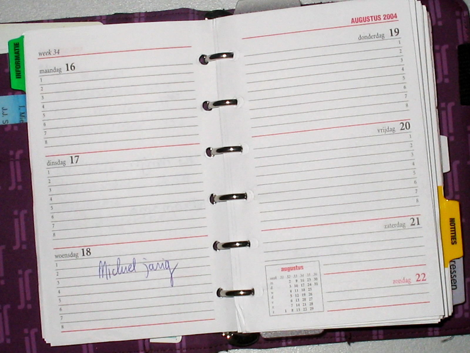 Dutch agenda